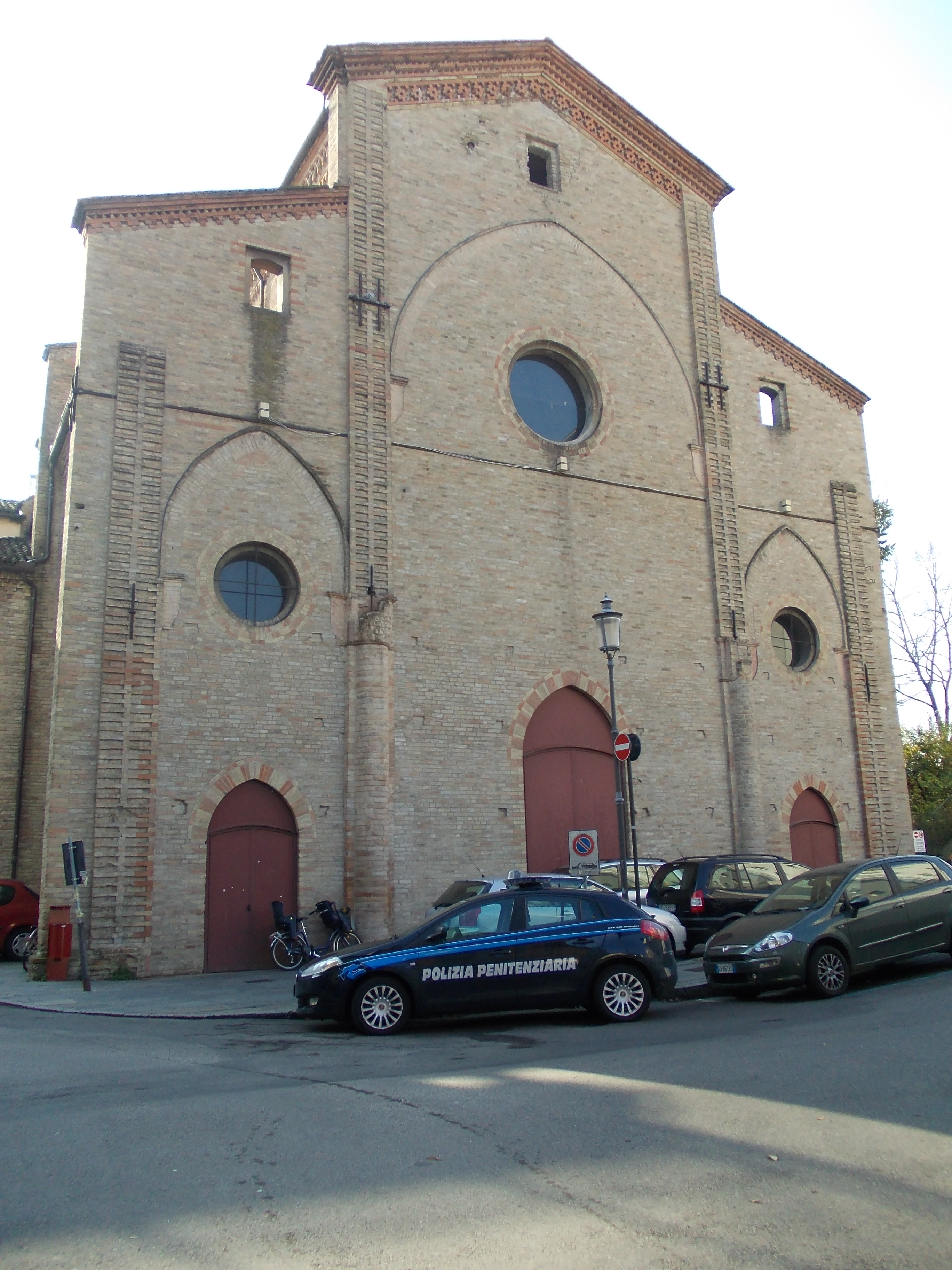 L'ex chiesa di Santa Maria del Carmine a Parma, sede del conservatorio Boito